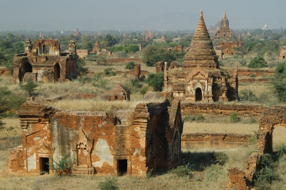 Blick über das Ruinenfeld von Bagan